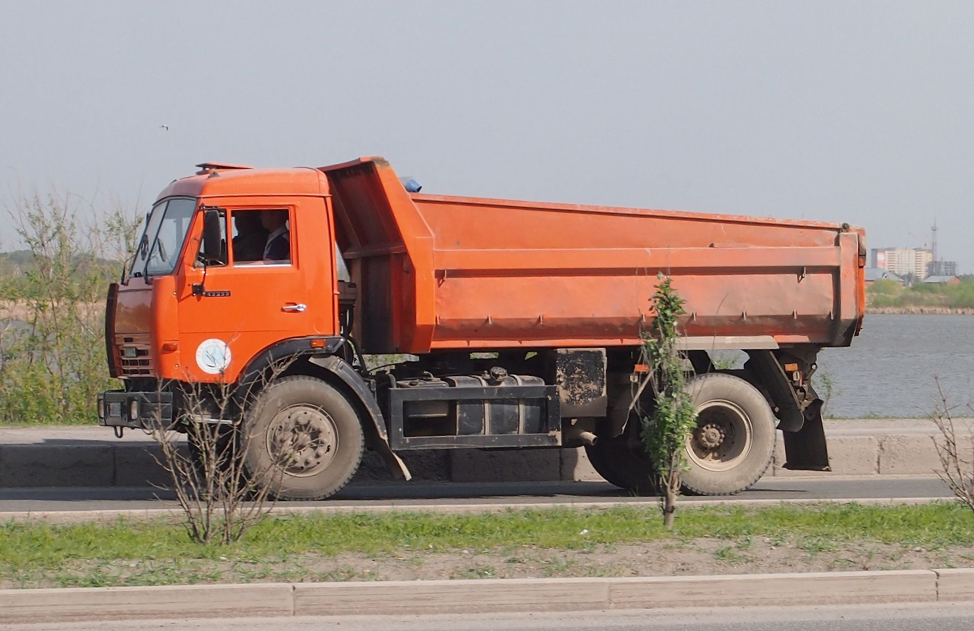 КАМАЗ-43255, Тюмень